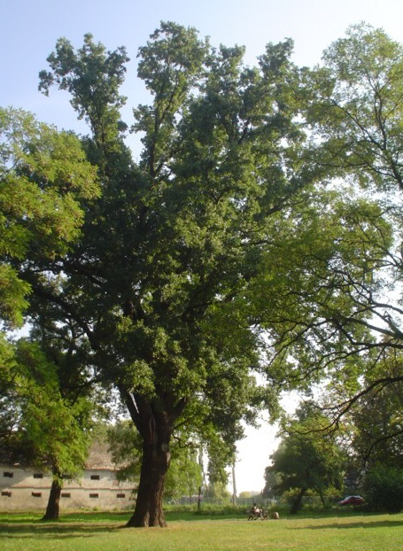 Sochaczew - Park Czerwonkowski - pomnikowy okaz dębu.